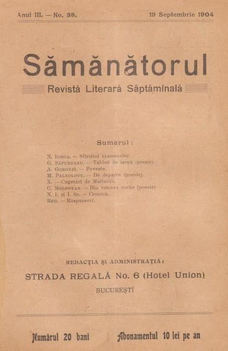 Sămănătorul first page - issue no. 38, dated September 19, 1904